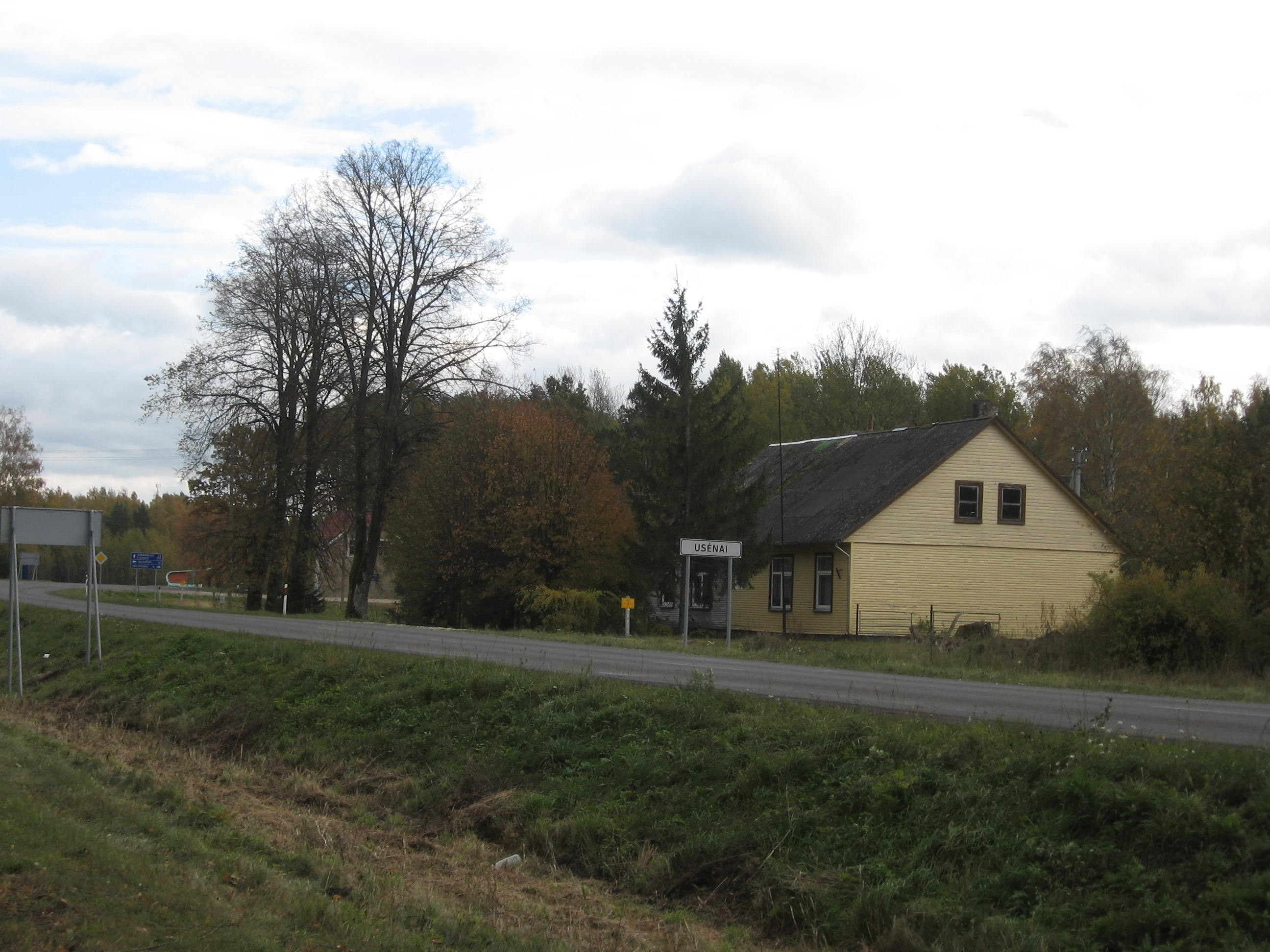 Usėnai